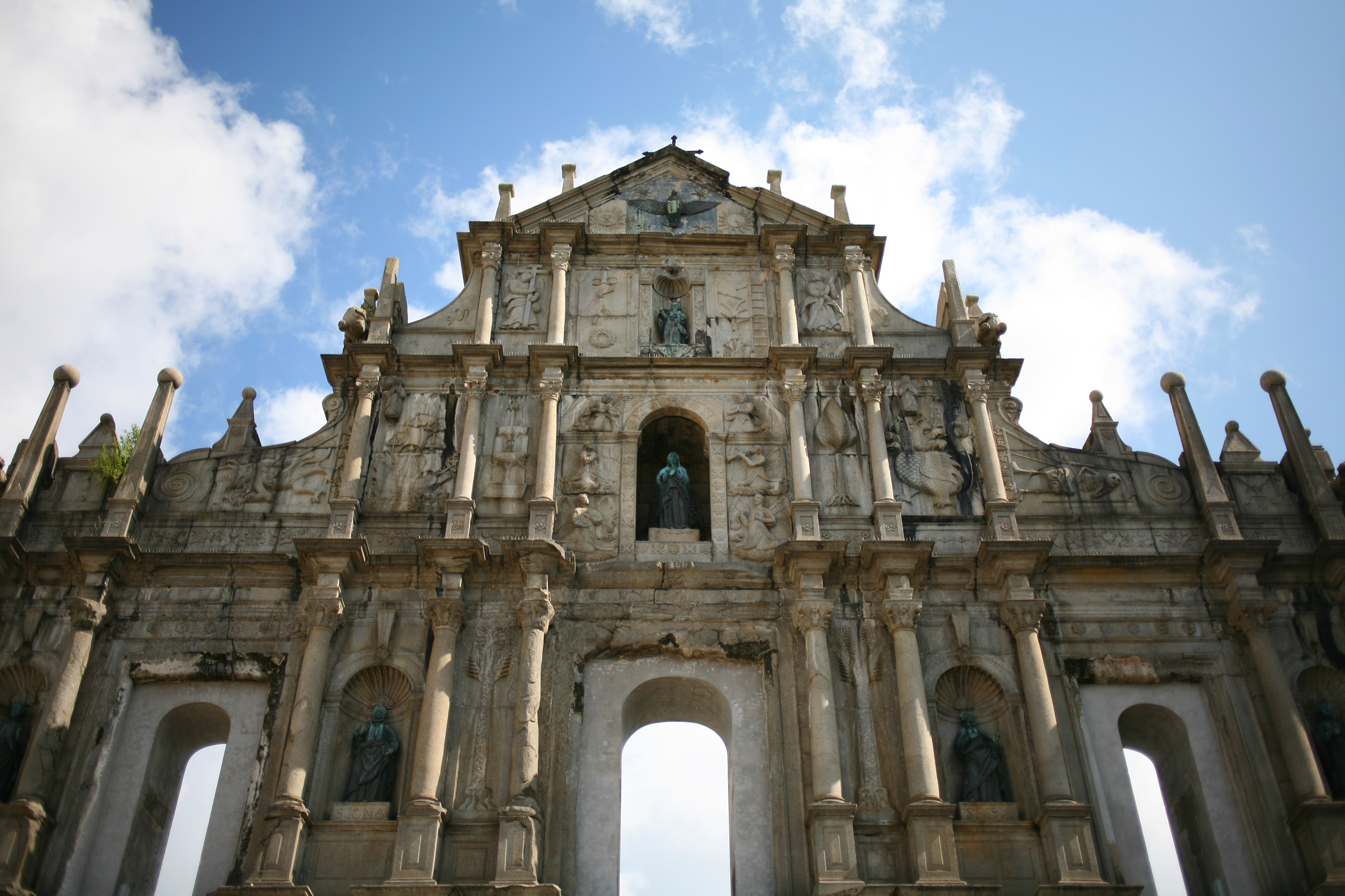 Dettaglio prospettico della facciata della Cattedrale di San Paolo, Macao